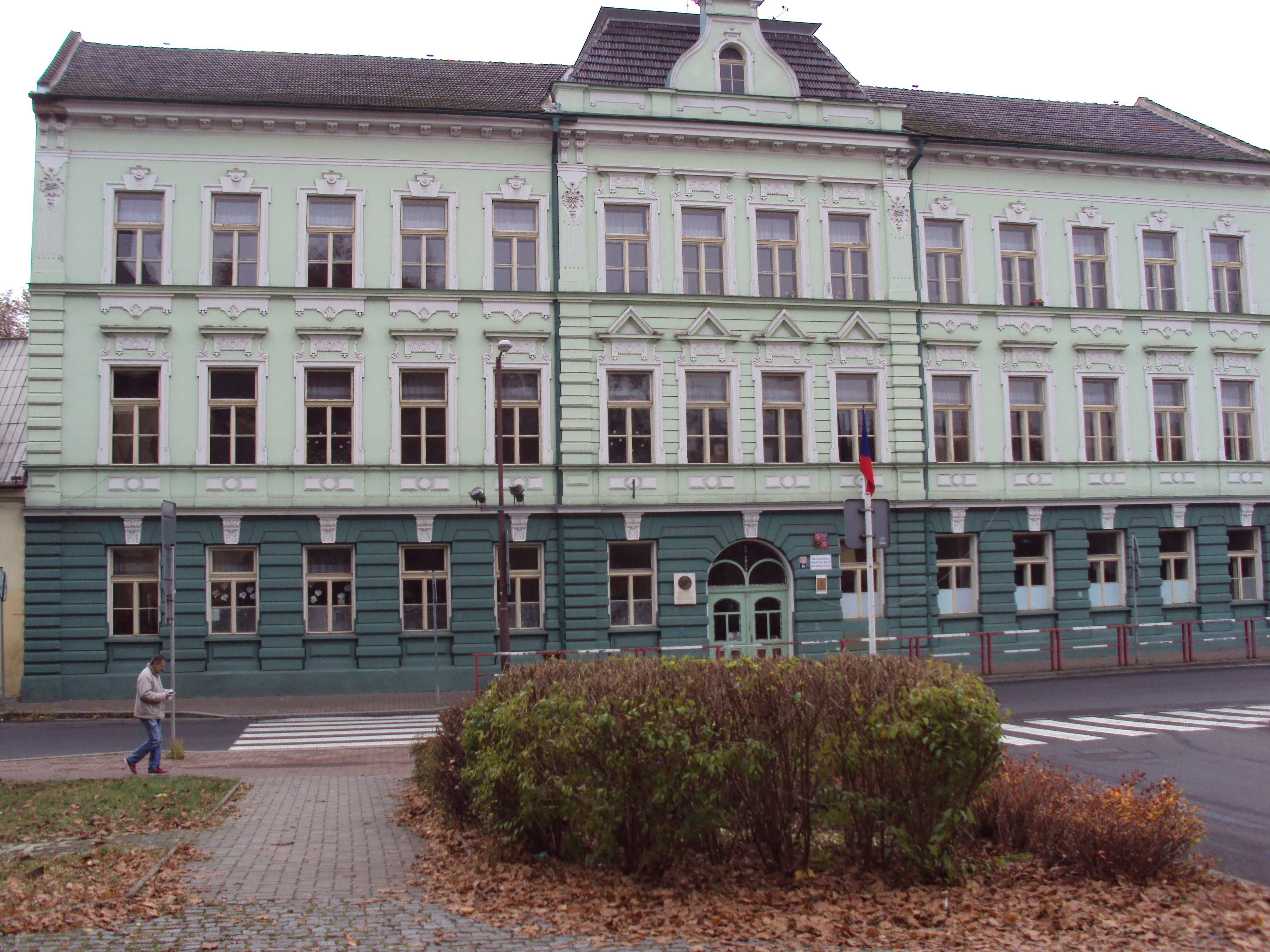 Budova Arbesovy školy v České Lípě, kde byl Jakub Arbes vězněn